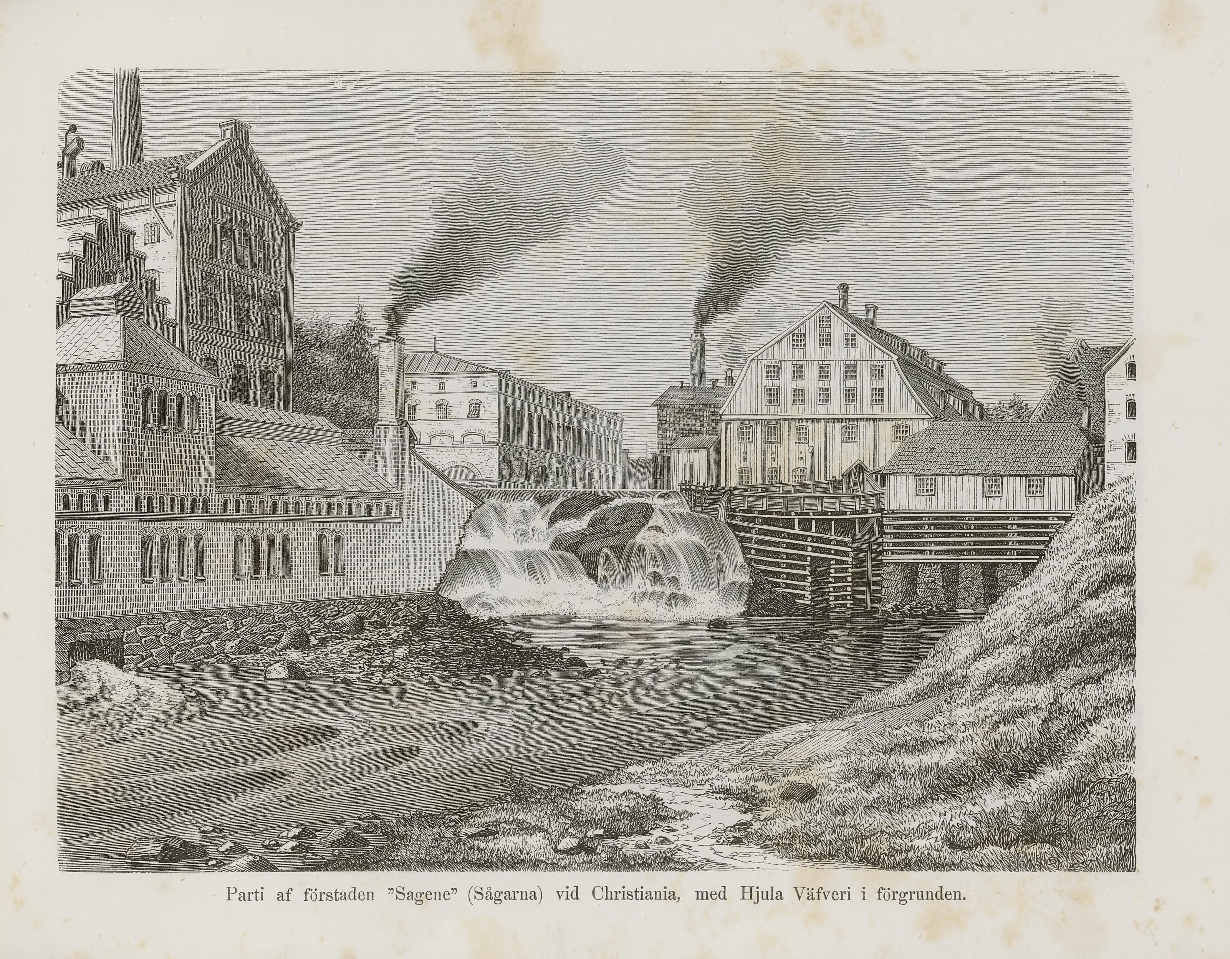 Illustrasjon hentet fra boken Nordiska taflor av ukjent forfatter og utgitt av Albert Bonnier (se, 1867)